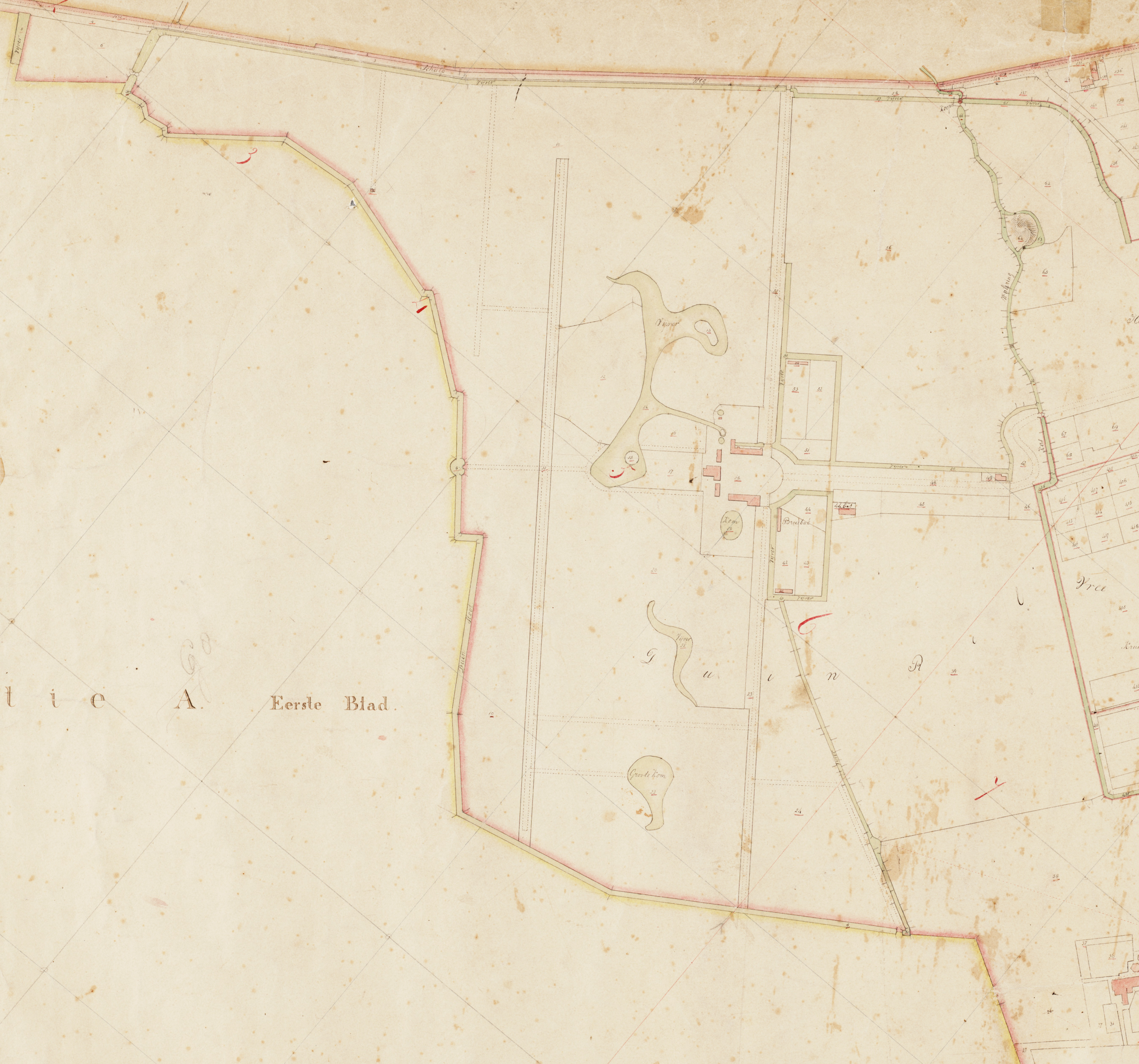 Kadastrale kaart 1811-1832: minuutplan Wassenaar, Zuid Holland, sectie F, blad 01 (MIN08224F01)